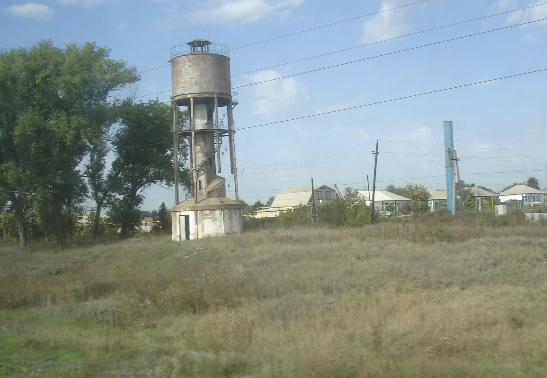 Водонапорная башня возле ЖД-станции Икорец